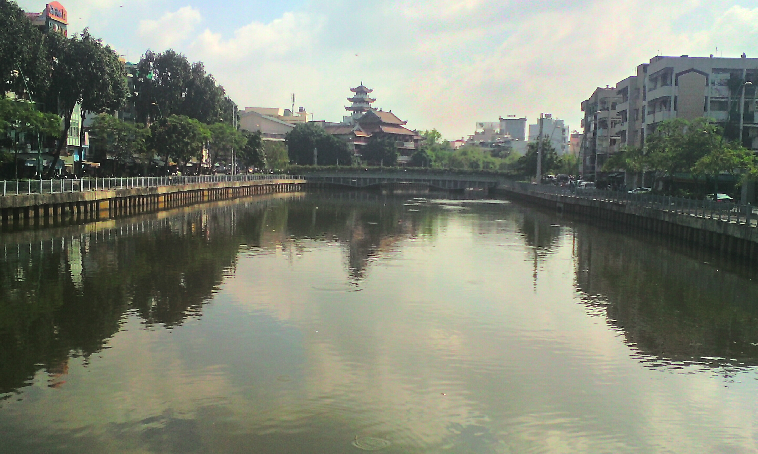 Kênh NL-TN nhìn từ cầu số 9